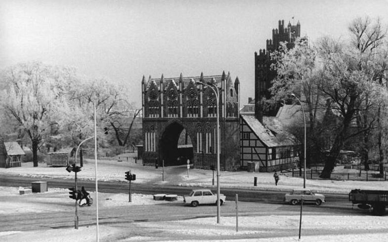 Neubrandenburg, Stadttor, Winter ADN-ZB Bartocha 22.1.82 Neubrandenburg: Wieder wie neu präsentiert sich jetzt das Vortor des zur 2,3 Kilometer langen Stadtmauer gehörenden Torkomplexes. Bis zu den erstmalig in der mecklenburgischen Bezirksstadt stattfindenden Arbeiterfestspielen im Juni soll auch der Innenausbau abgeschlossen sein. Das Vortor wird dann vom Bezirksmuseum als Vortragszentrum genutzt. Information added by Wikimedia users.